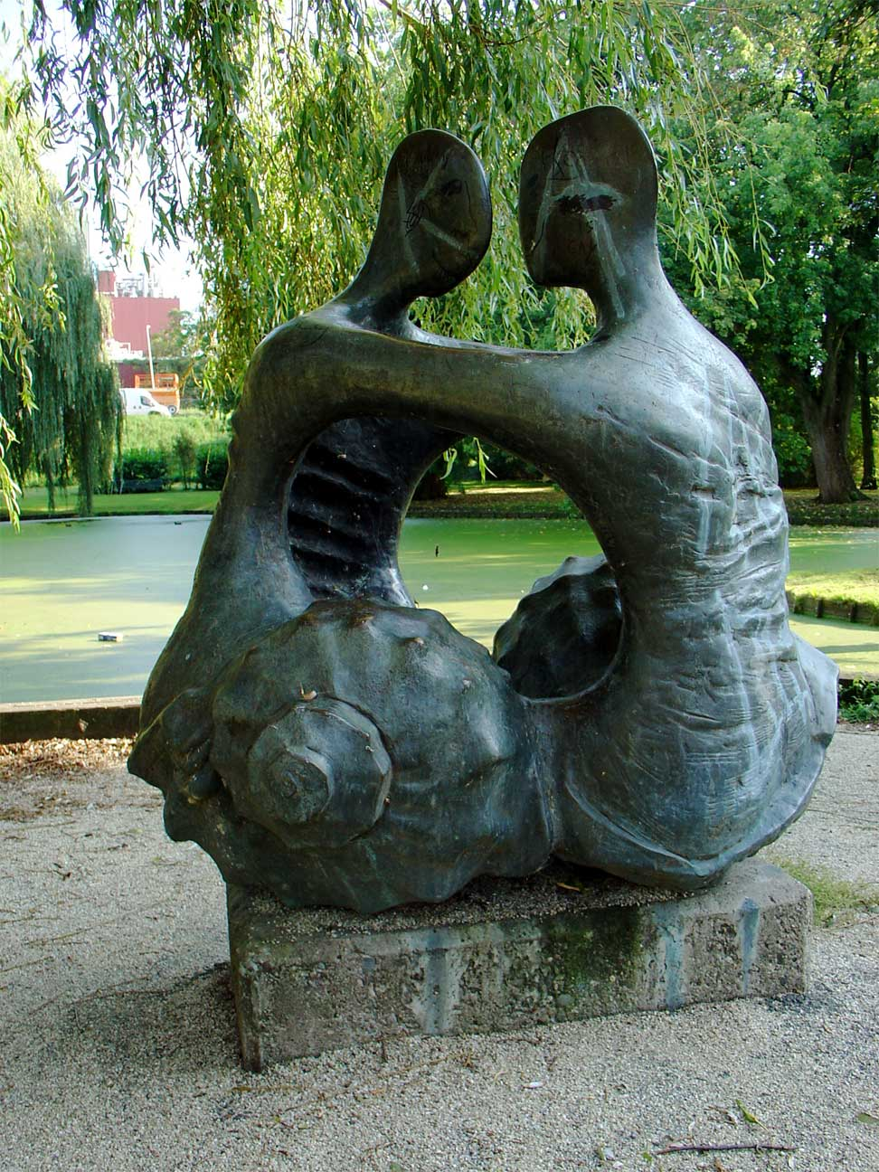 Zonder titel (relatie mens - water) (brons, 1979) door Maja van Hall - P.C. Hooftstraat te Gouda)